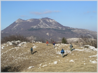 Planinarenje po Učki